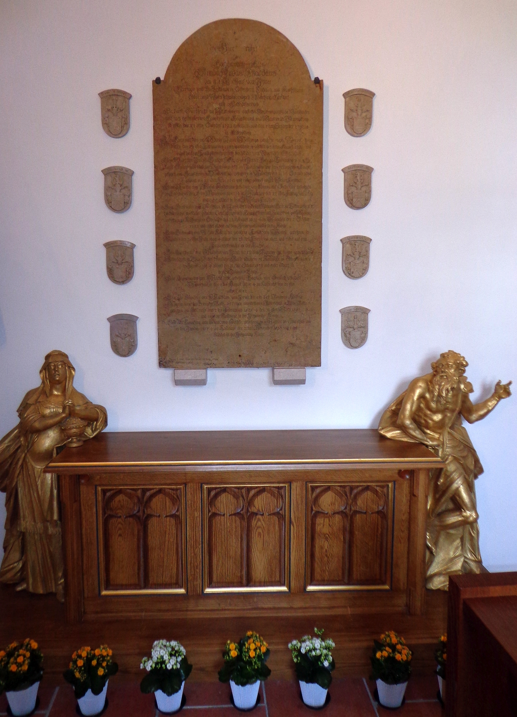 Pfarrkirche St. Martin (Tettenweis), Marienkapelle: Gesamtansicht des Grabdenkmals für Simon Judas Thaddäus Grafen von Joner auf Tettenweis (1723–1797)